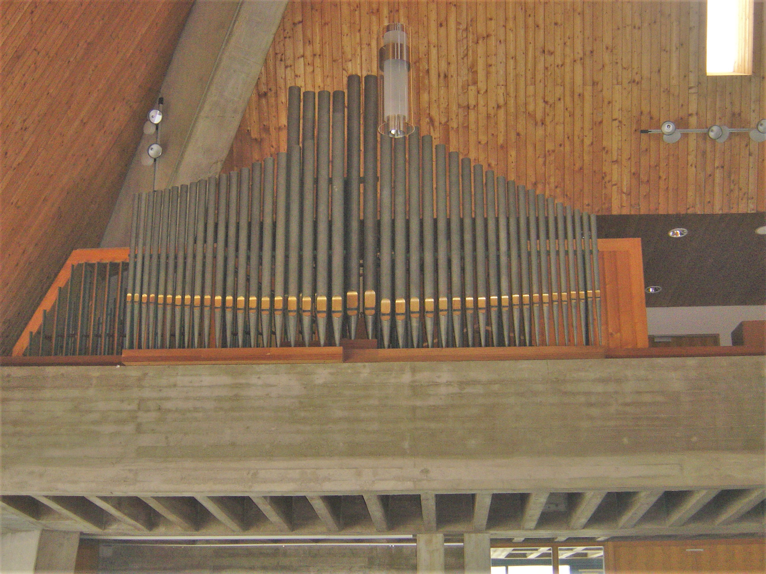 Orgel der Kapernaumkirche München